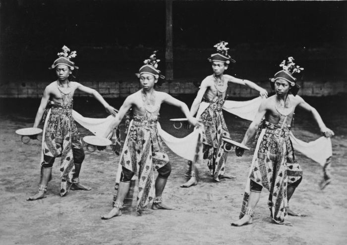 Foto. Beksan Entheng dansers aan het hof van de sultan van Jogjakarta